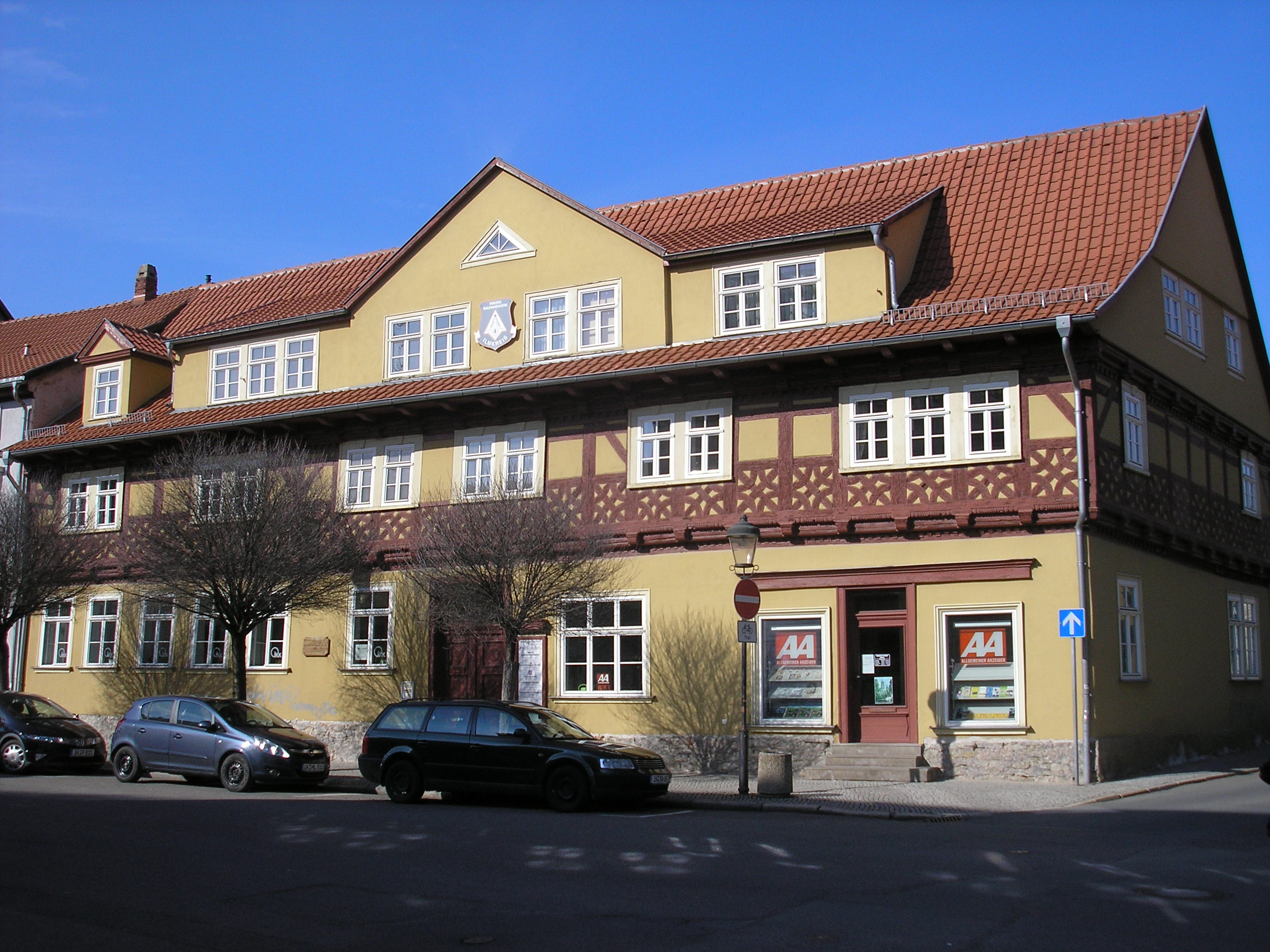 Das Haus zum Ritter am Kohlenmarkt 20 in Arnstadt (Thüringen).